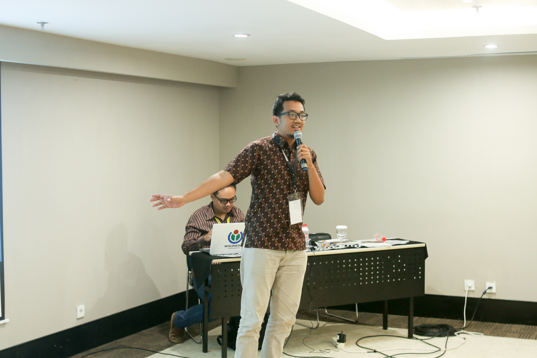 Dokumentasi foto dari WikiNusantara 2019 di Yogyakarta, 27–28 April 2019.